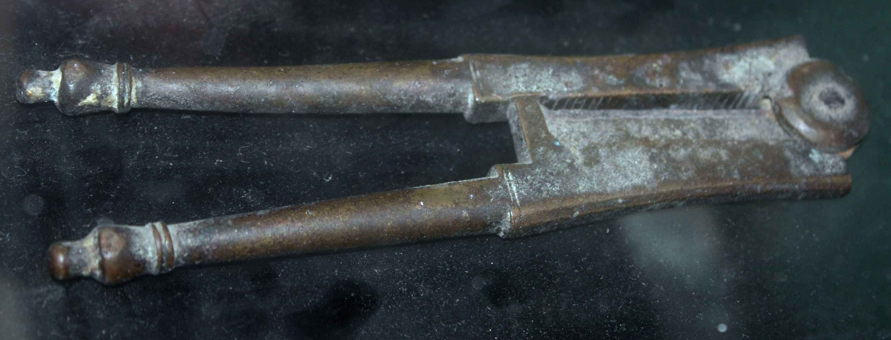 பாக்கு வெட்டி - மட்டக்களப்பு அருங்காட்சியகம்